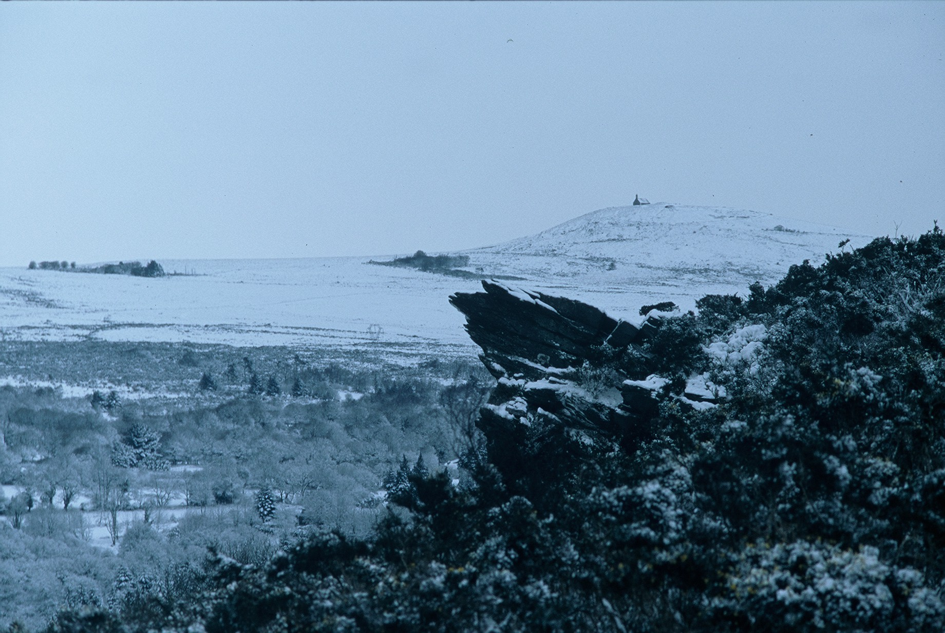 Roc'h-Beg-hir en St Rivoal en hiver, Montagne St Michel en arrière plan.